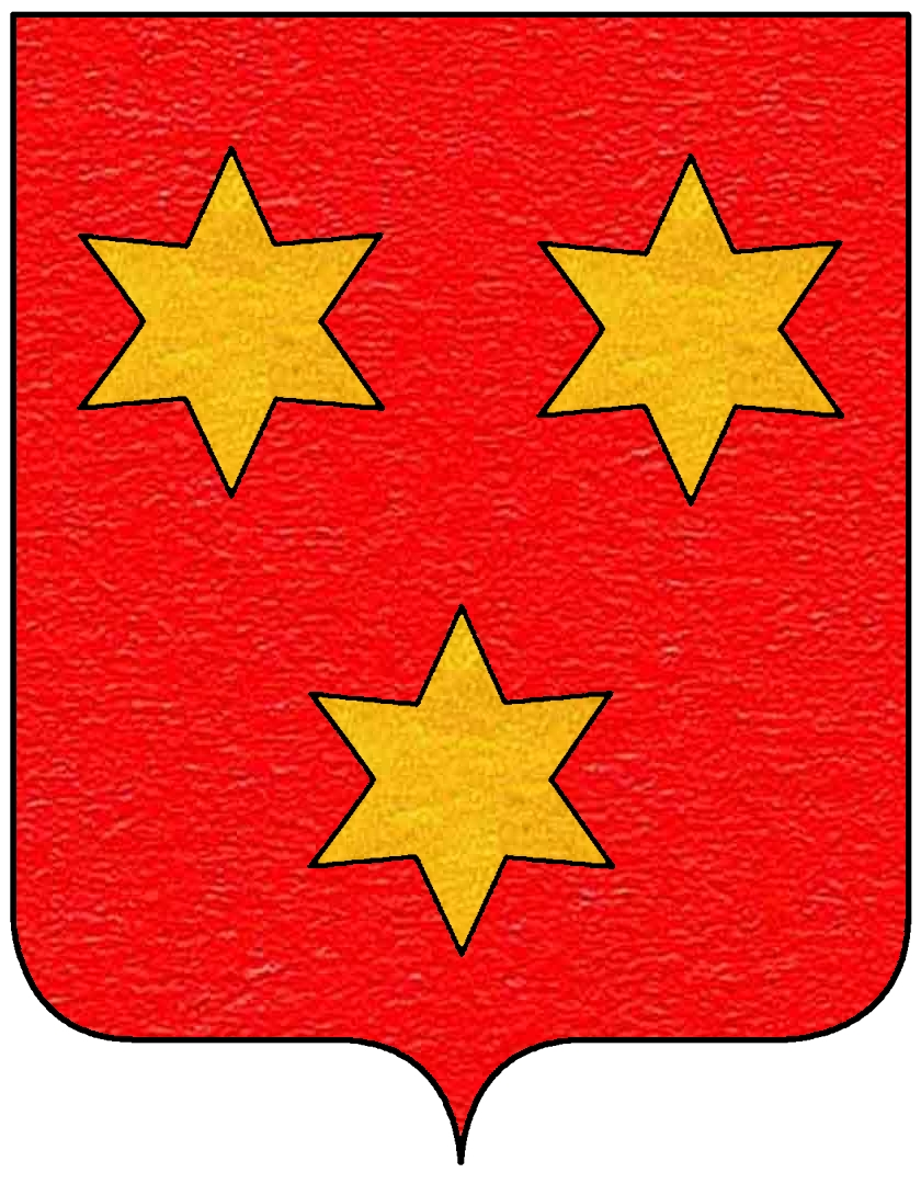 Stemma della famiglia Prodanelli